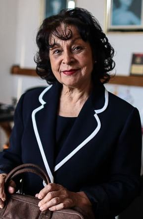 Raquel Blandón, candidata.